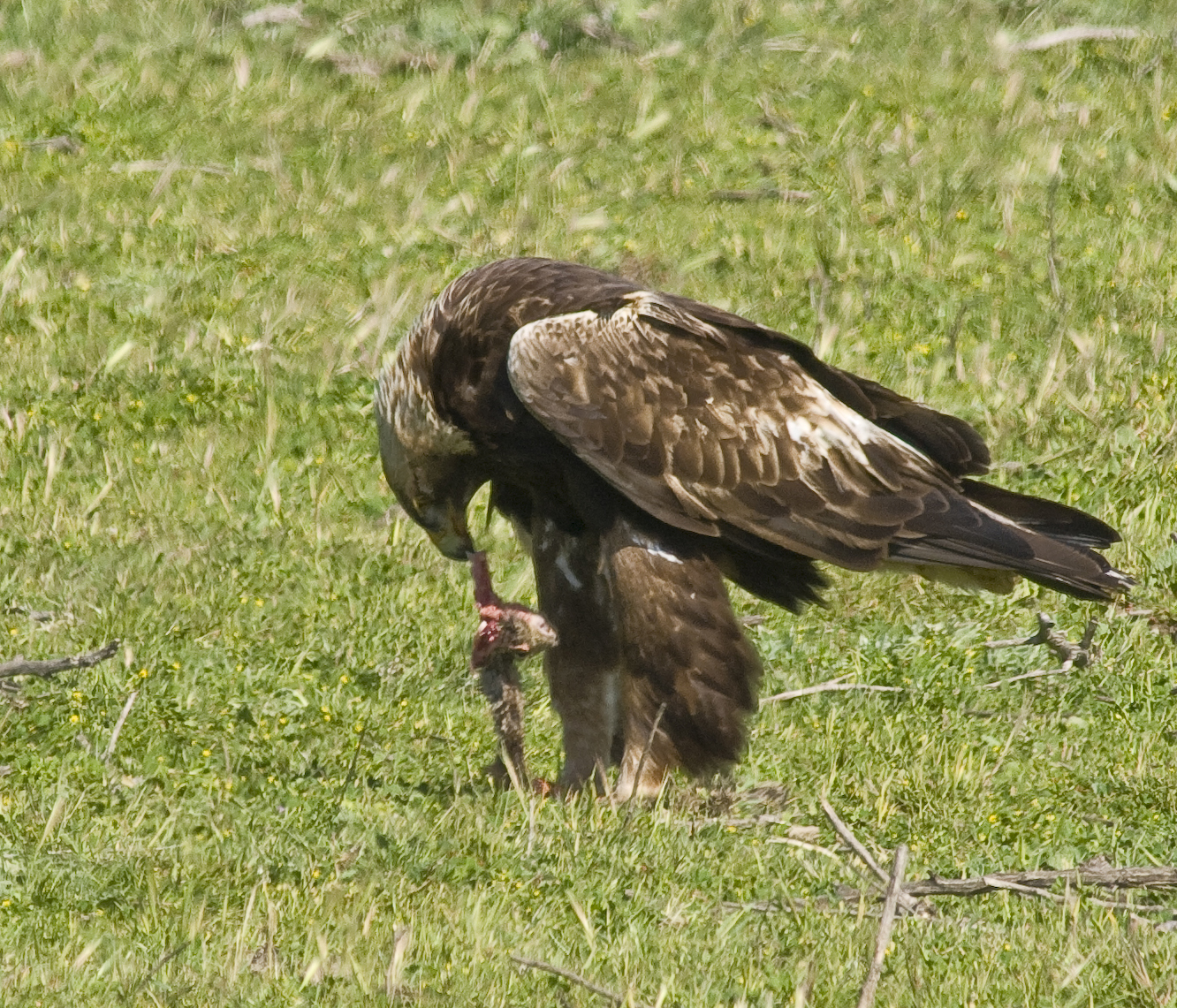 Golden Eagle Aquila chrysaetos, Los Osos Valley Road, San Luis Obispo, California.